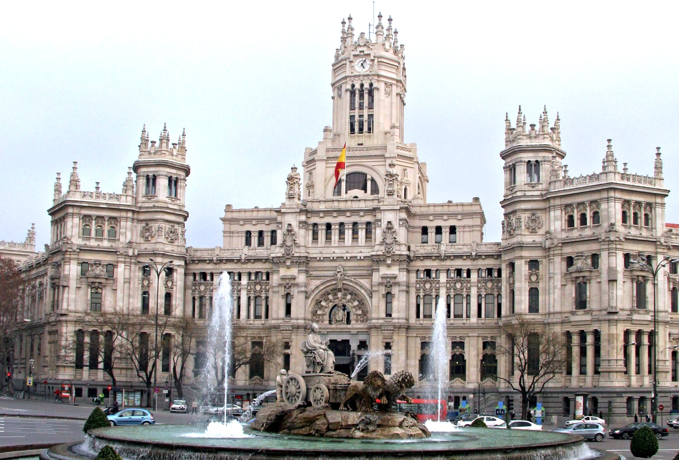 Fuente de Cibeles y Palacio de Comunicaciones, en Madrid